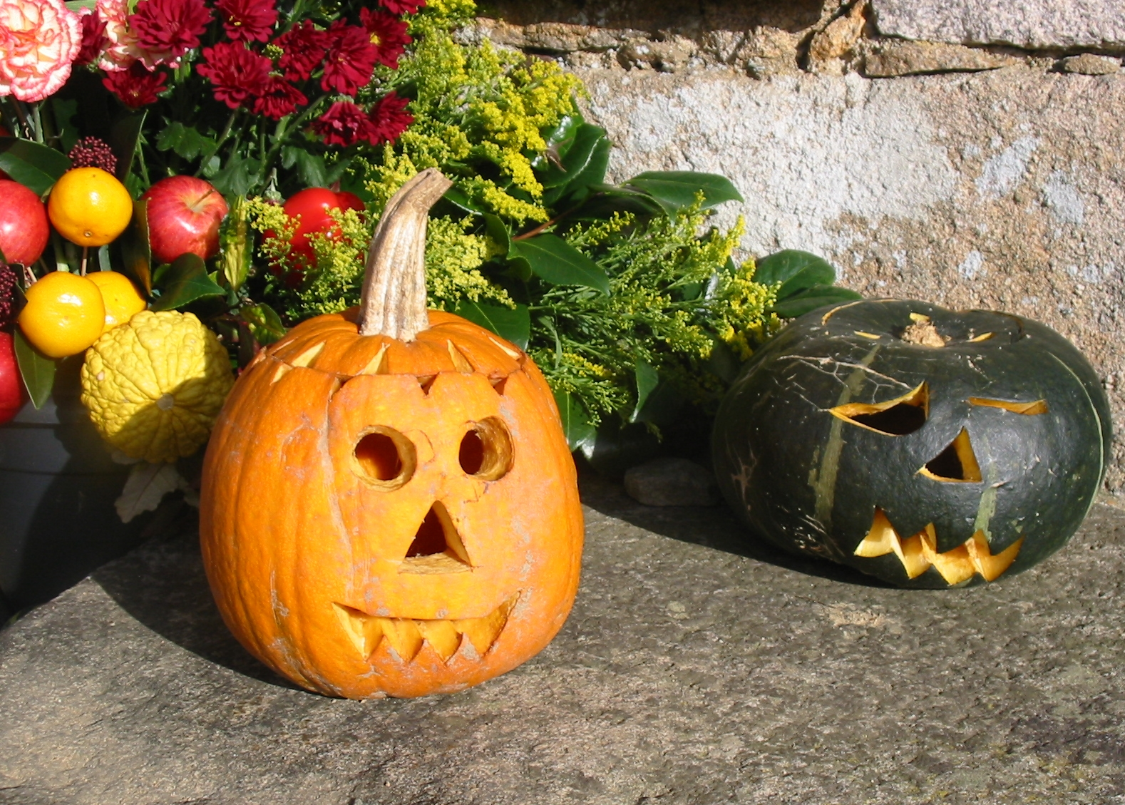 Deux balles-à-leunettes - two jack-o-lanterns